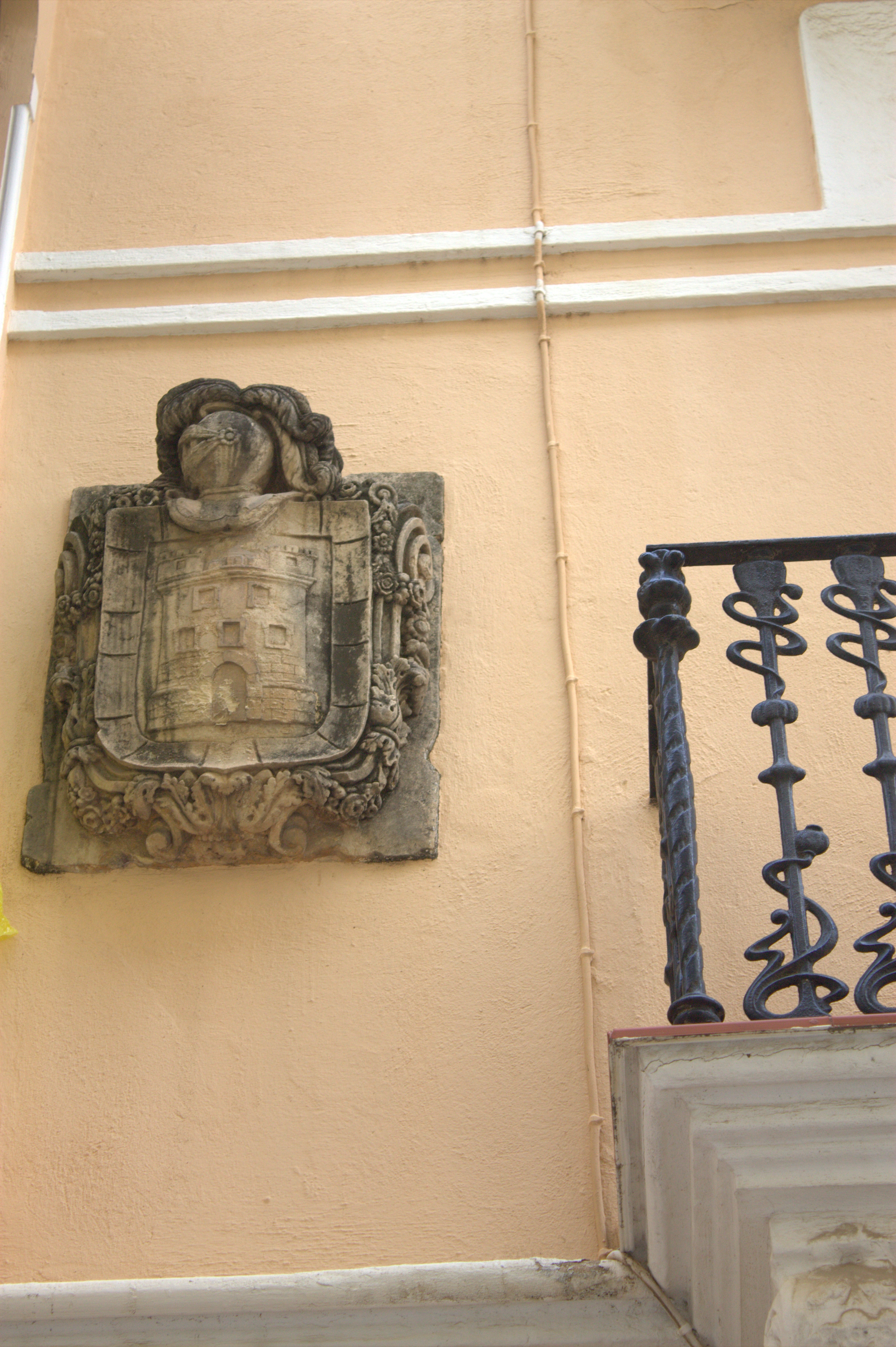 Escut a l'edifici del carrer Sant Roc, 13 (Alzira)